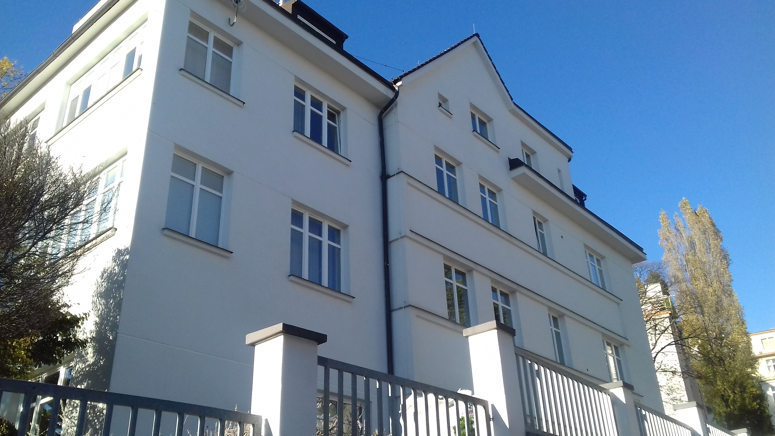 též Alvína